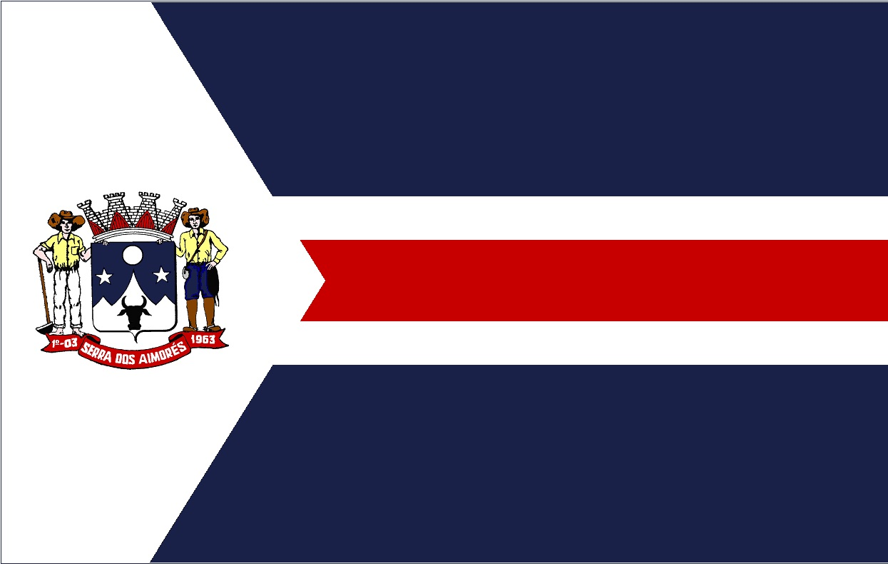 Bandeira de Serra dos Aimorés